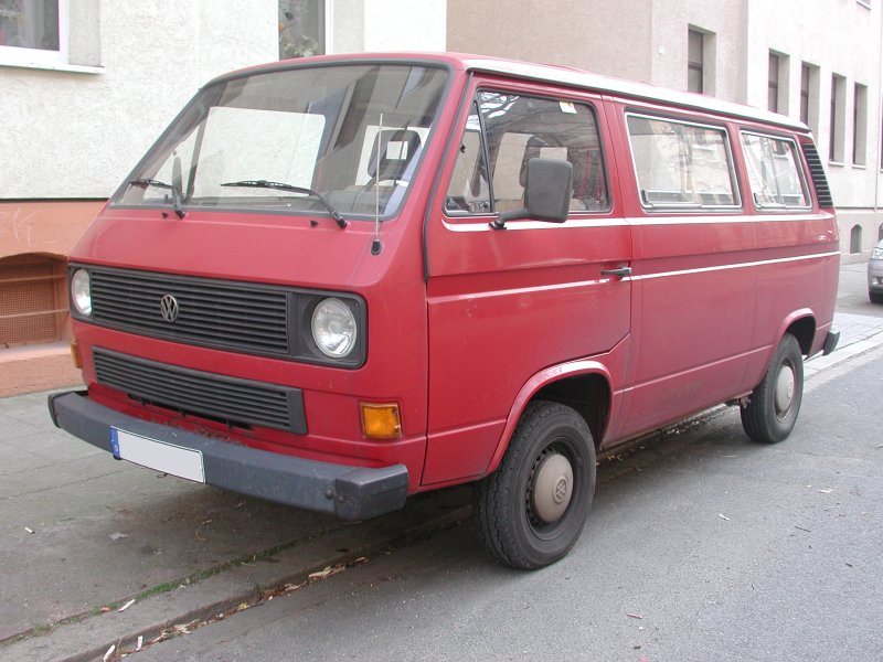 VW Type2 T3 Kombi. Mid-1980s VW Type 2 Kombi.